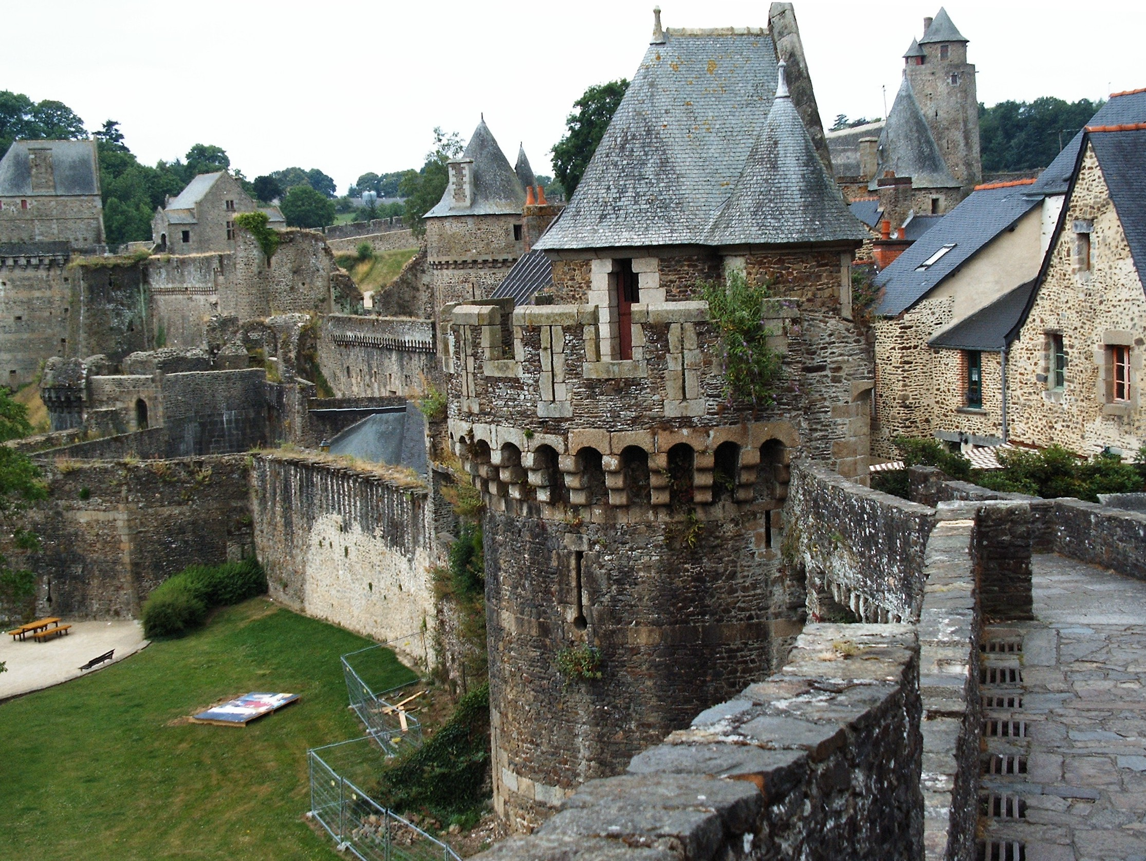 Fougères - Stadtmauer